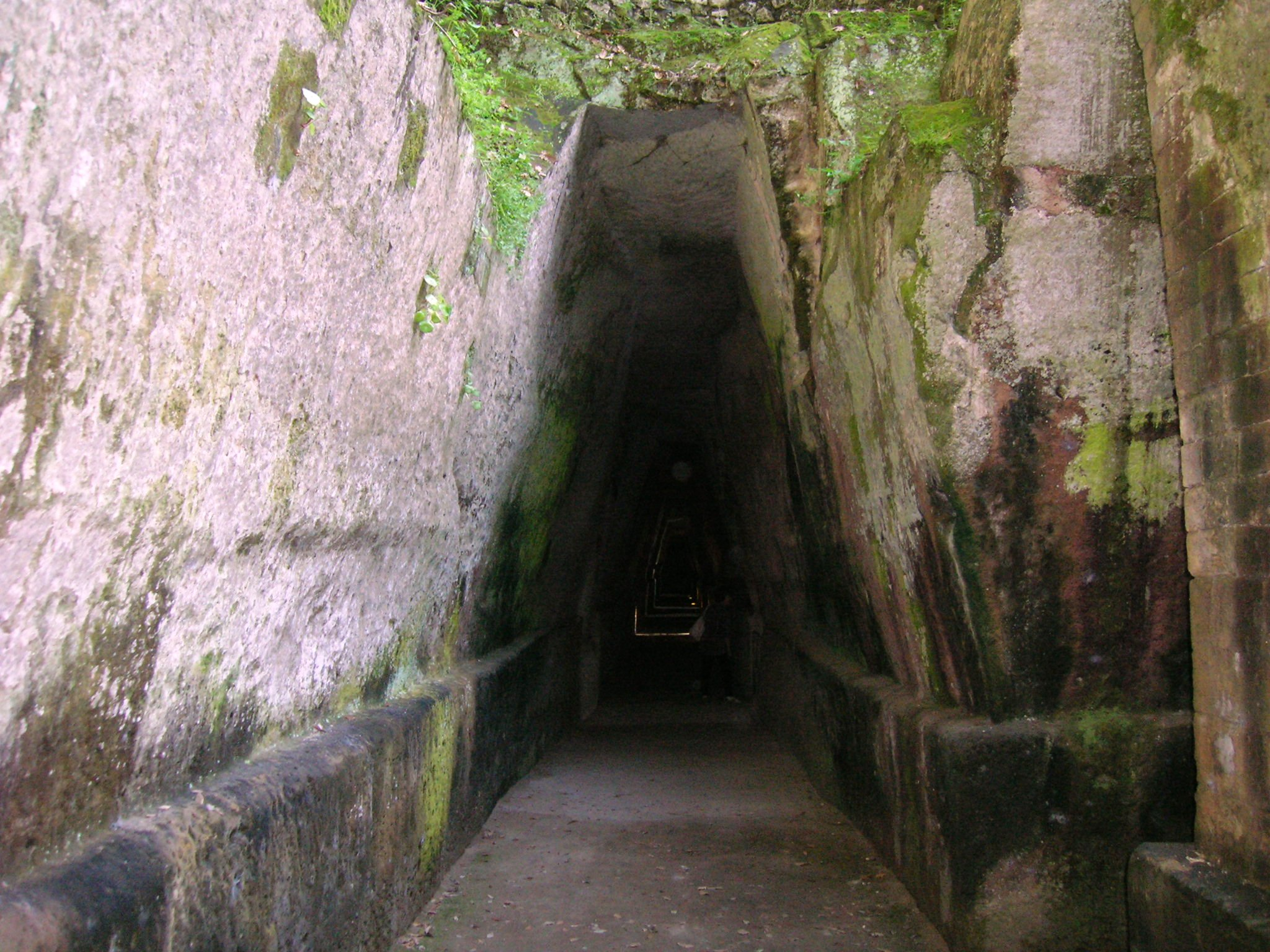 L'ingresso